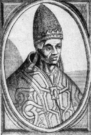 Pope Vitalian (Vitalianus)